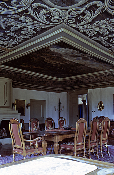 Takmålning i ett möblerat rum. Motiv: Laxå 5:1 Kategori: Bruksmiljö, Herrgård Takmålning i ett möblerat rum. Laxå 5:1.